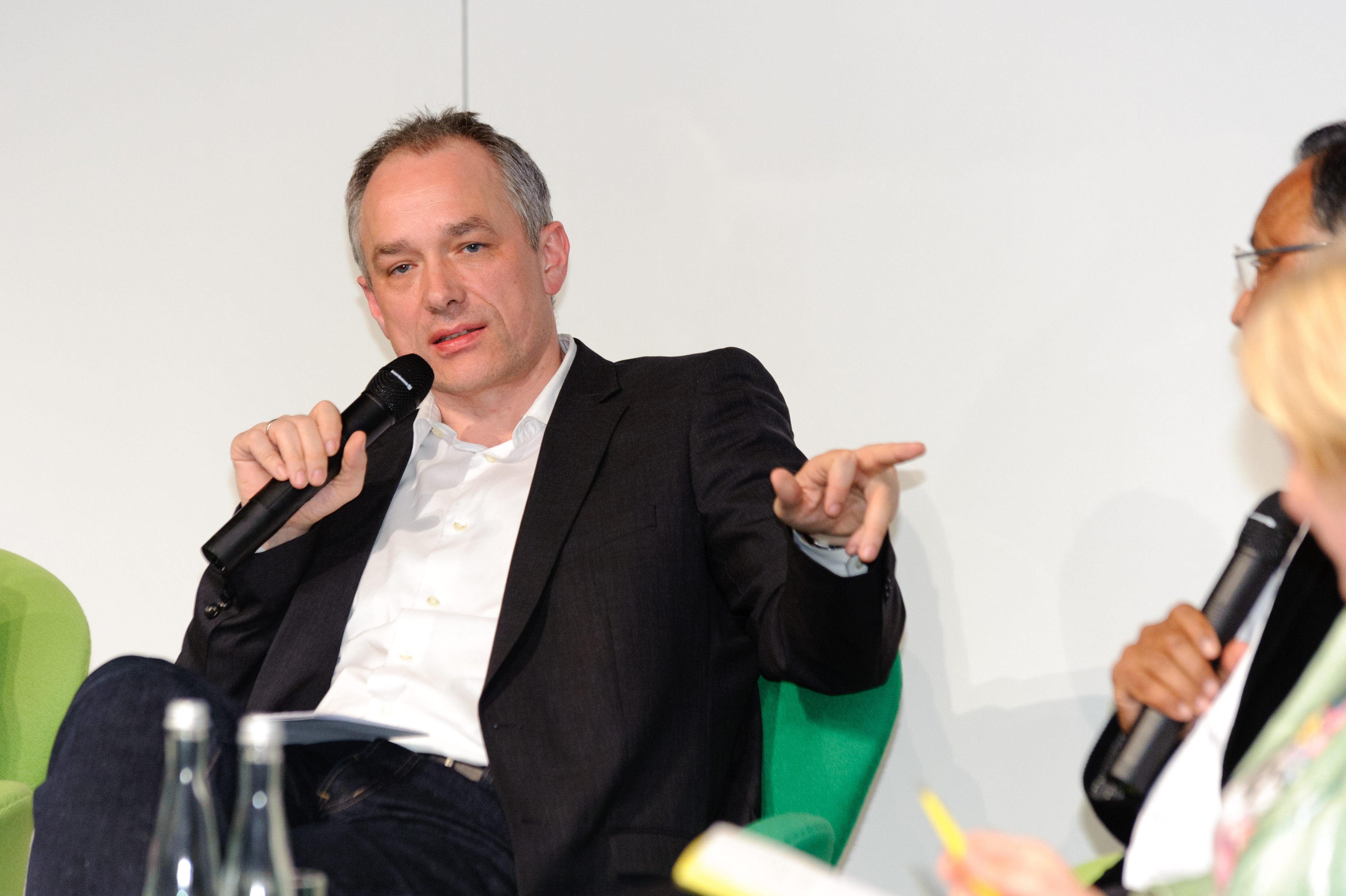 Martin Spwieak (DIE ZEIT) Foto: Stephan Röhl